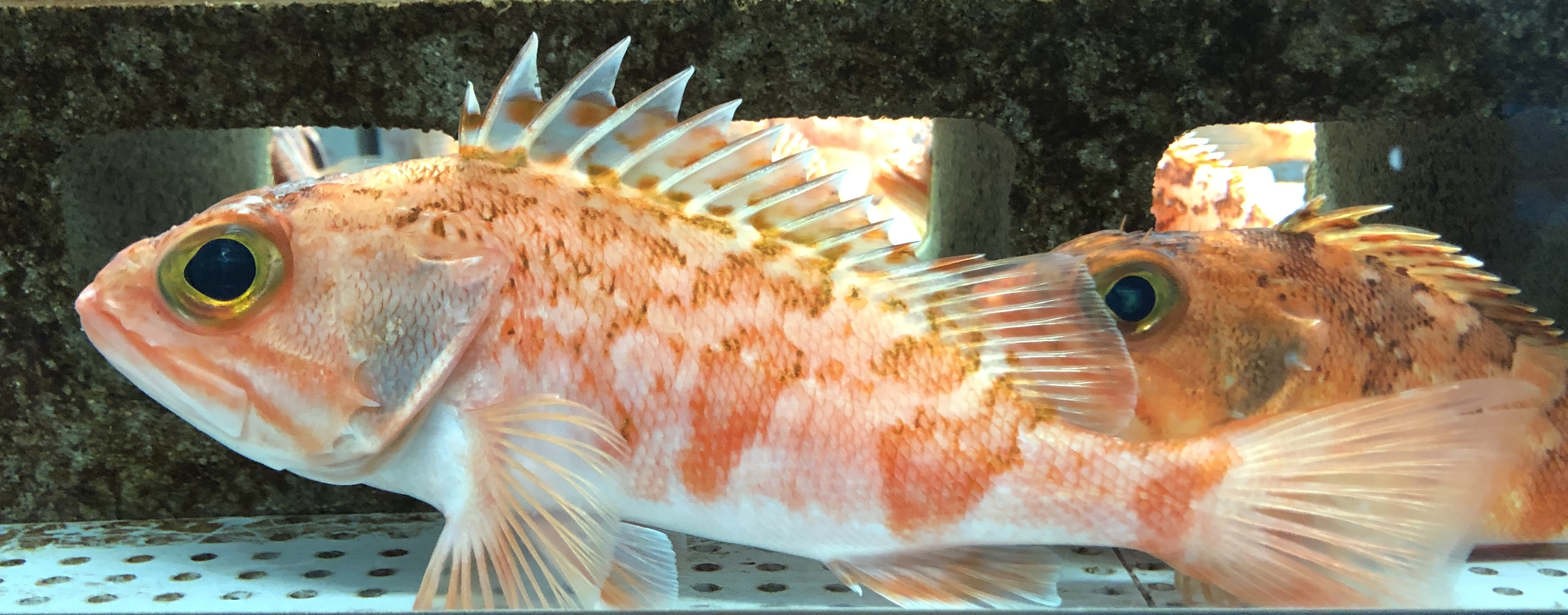 ユメカサゴ(Helicolenus hilgendorfii)。むろと廃校水族館飼育個体。